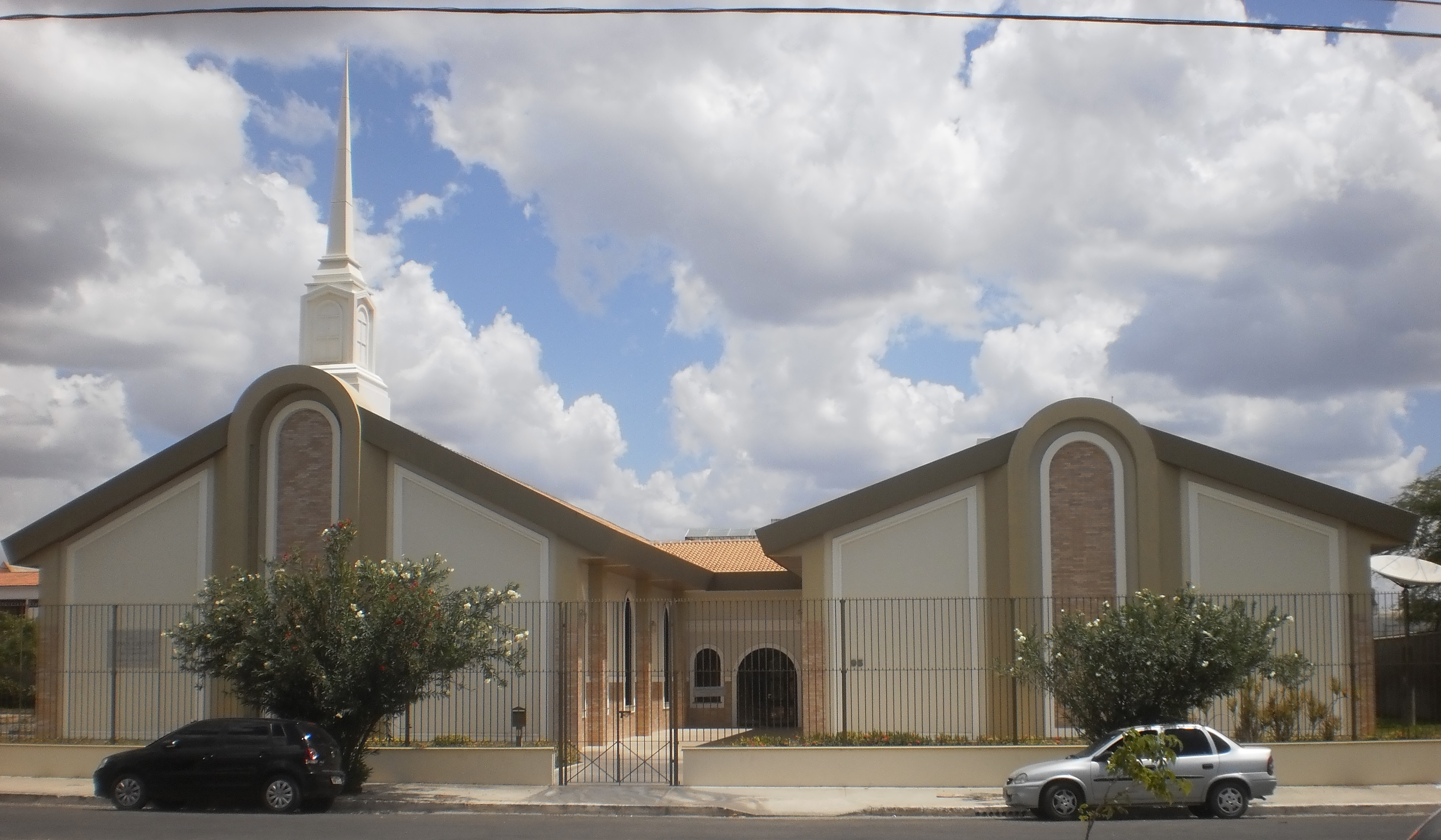 Capela de "A Igreja de Jesus Cristo dos Santos dos Últimos Dias" (Igreja Mórmon) em Mossoró - Rio Grande do Norte, Brasil.